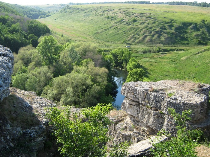 Галичья гора, Елецкий район This image is related to the protected area of Russia number 4800053